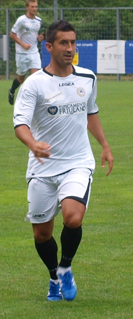 Pinzi in azione con l'Udinese